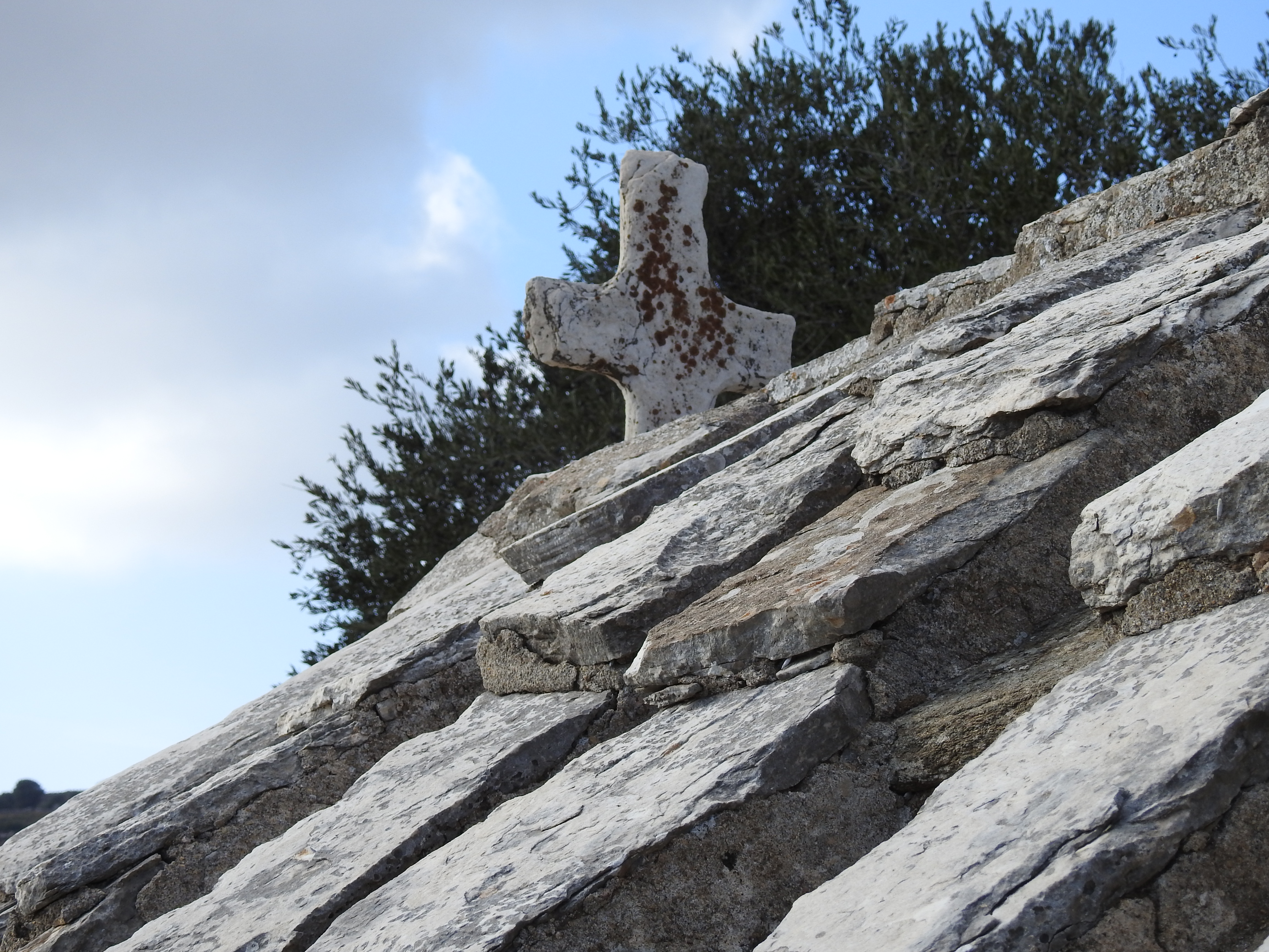 παλιές εκκλησίες ζωοδόχου πηγής ακριβός δίπλα από τον πύργο του χειμάρρου«Πύργος Χειμάρρου»